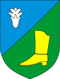 Herb miasteczka Kożangródek